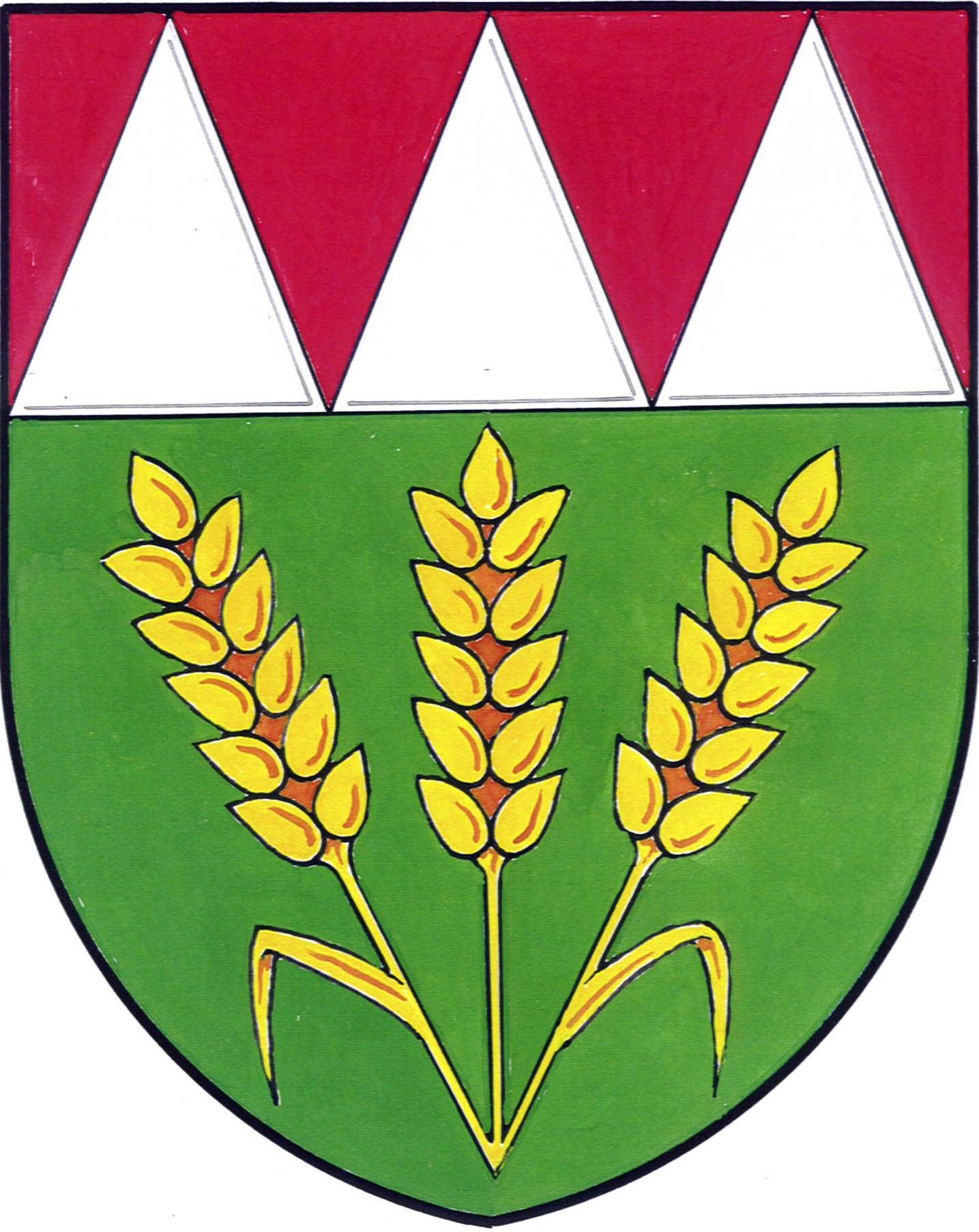 Česky: znak obce Bílsko